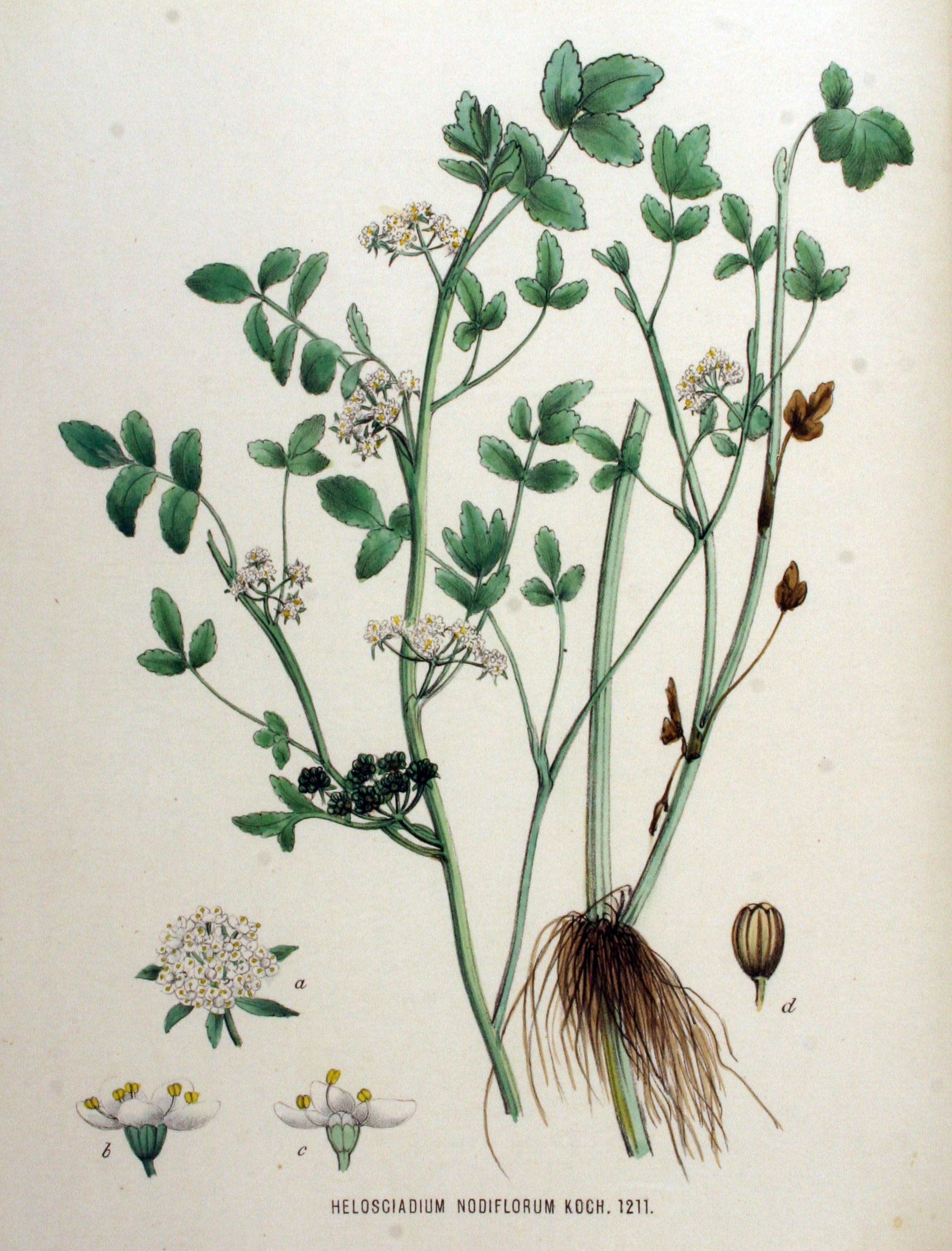 Apium nodiflorum (L.) Lag. (Syn. Helosciadium nodiflorum (L.) Koch)